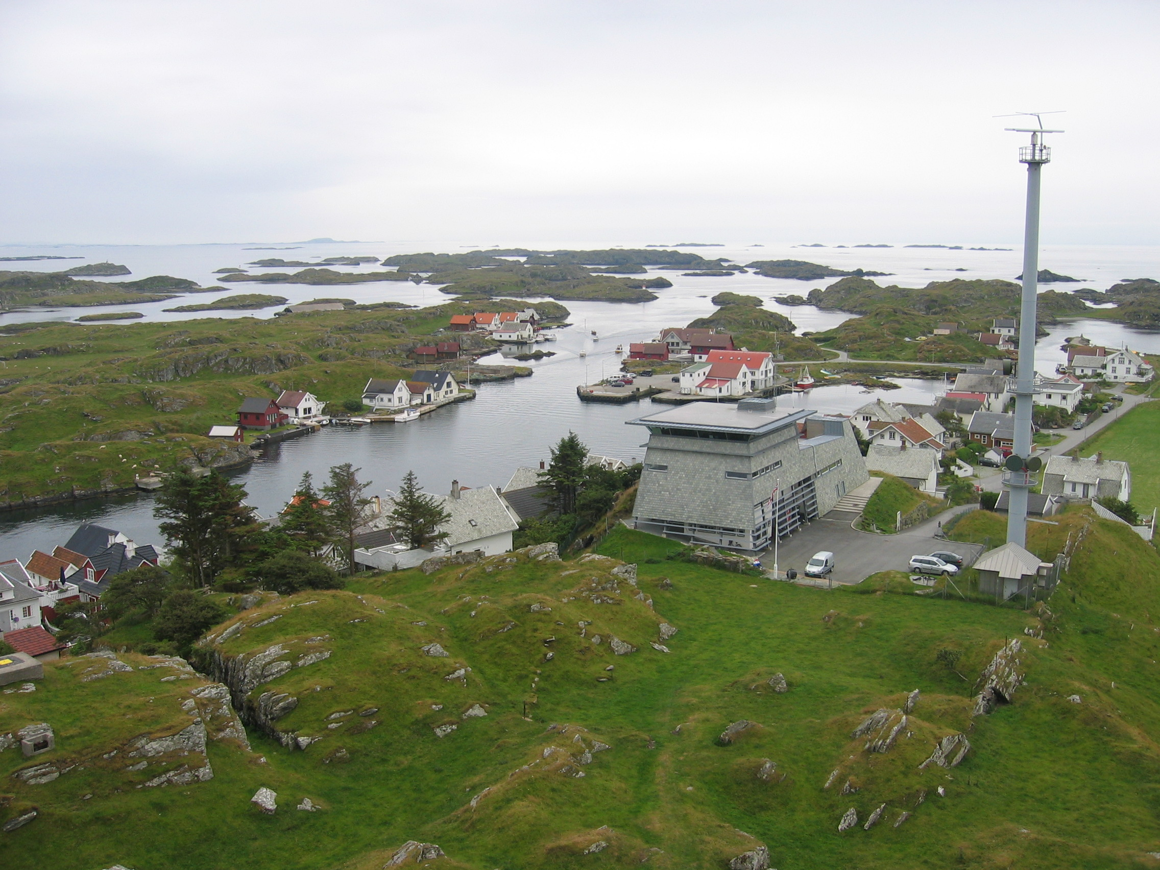 View over Kvitsoey3